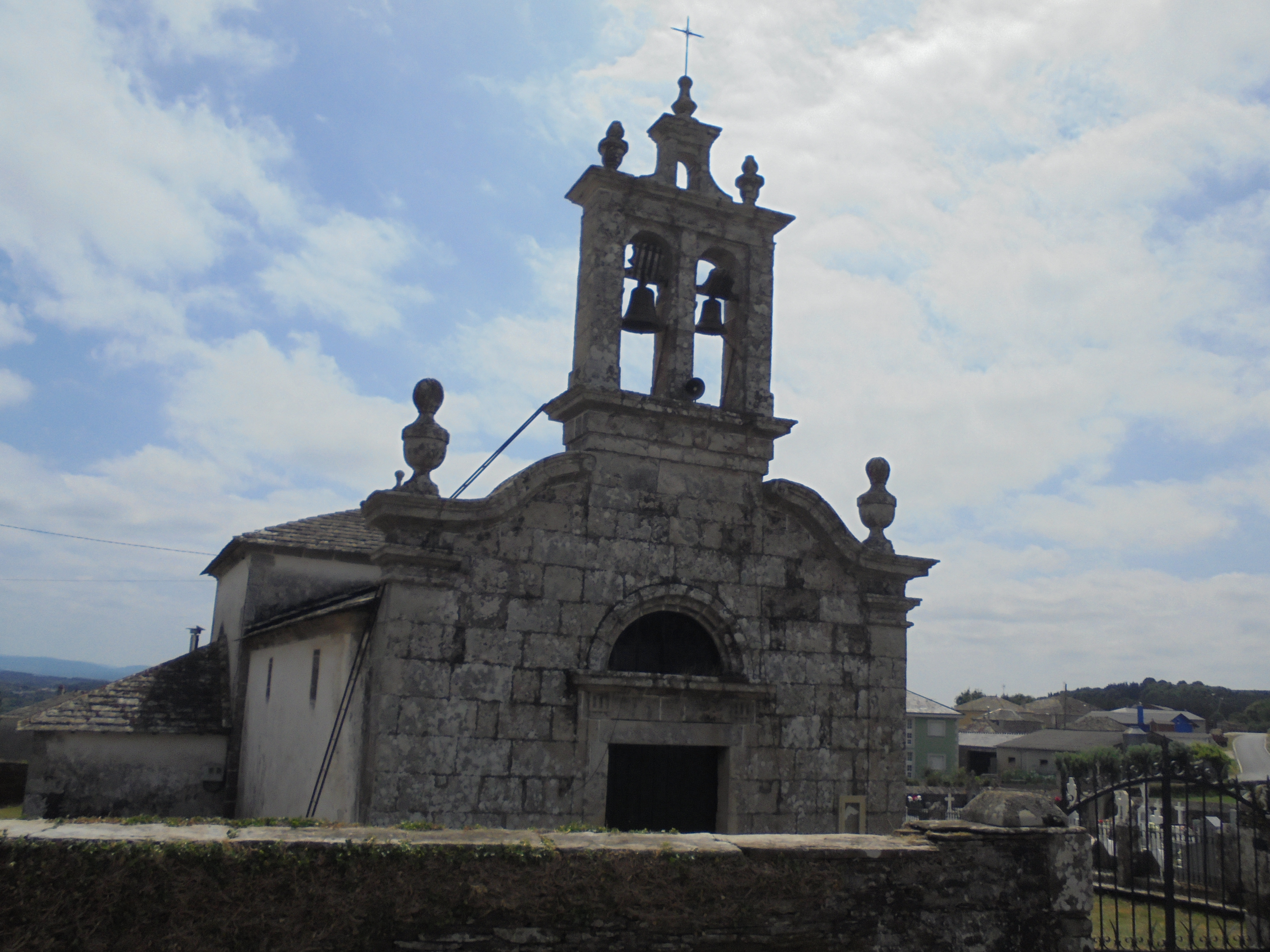 Igrexa parroquial de Coeses (Lugo)